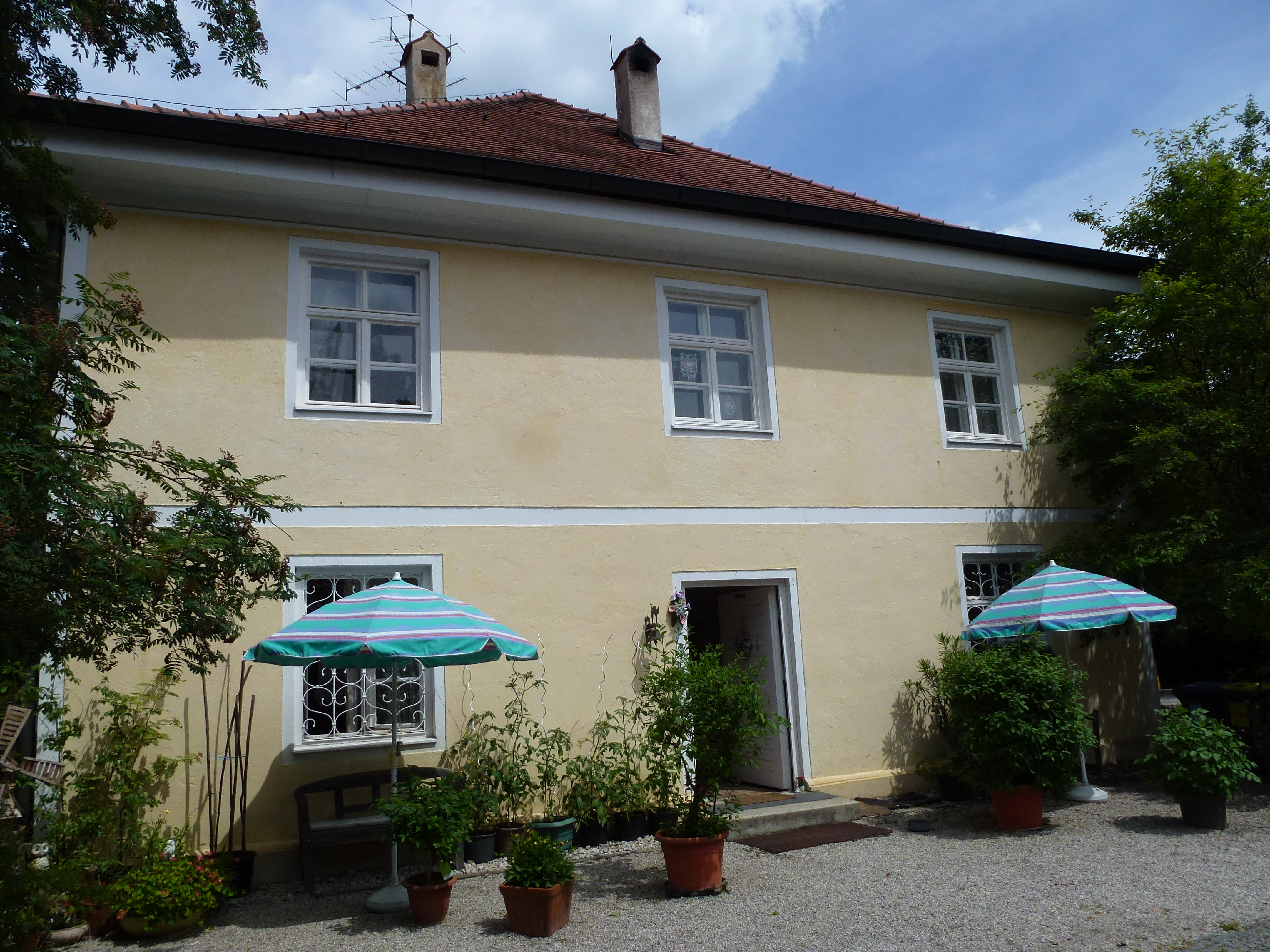 Giebing, Hauptstr.4: Pfarrhaus